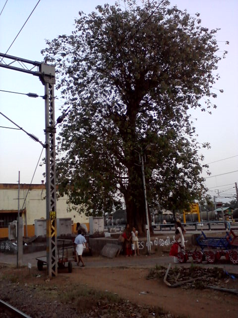 the baniyan tree at shornur railway station which was laid by swami vivekananada at his keralatrip